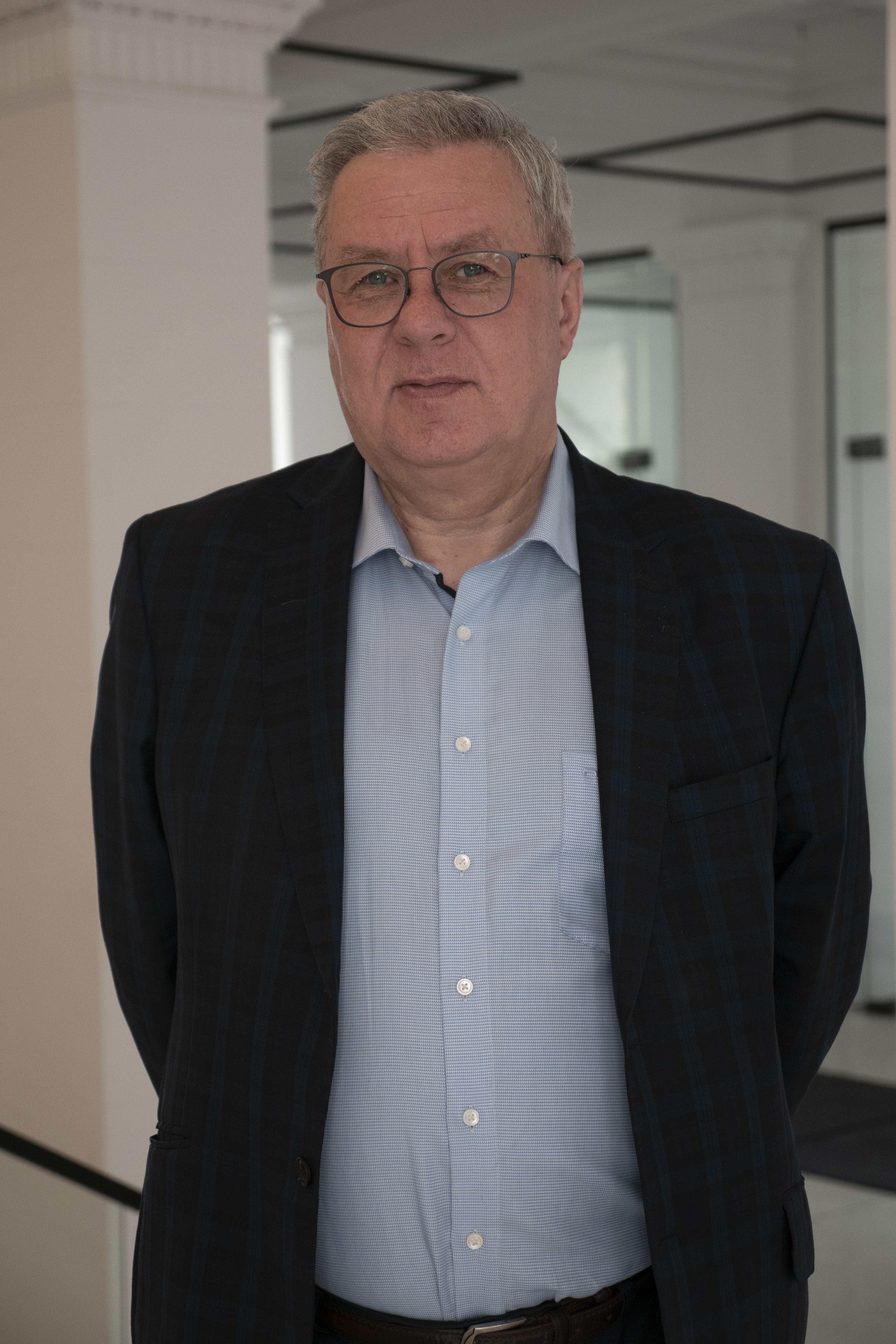 Tallinna Tehnikakõrgkooli rektor Enno Lend